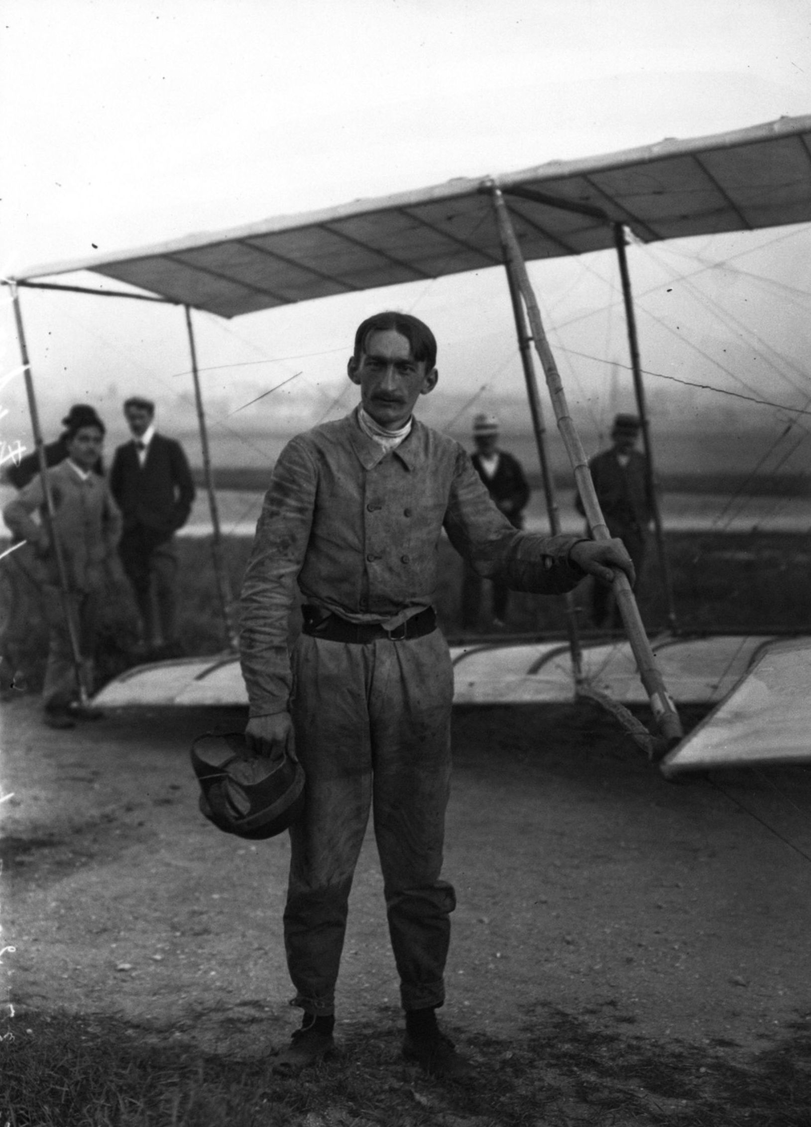 Georges Legagneux (1882-1914). « Legagneux, 19 août 1908, gagnant du 3e 200 mètres avec le Ferber IX. »